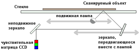 Технология сканирования